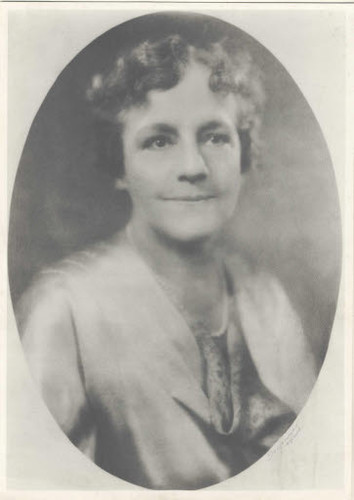 Prise vers 1920